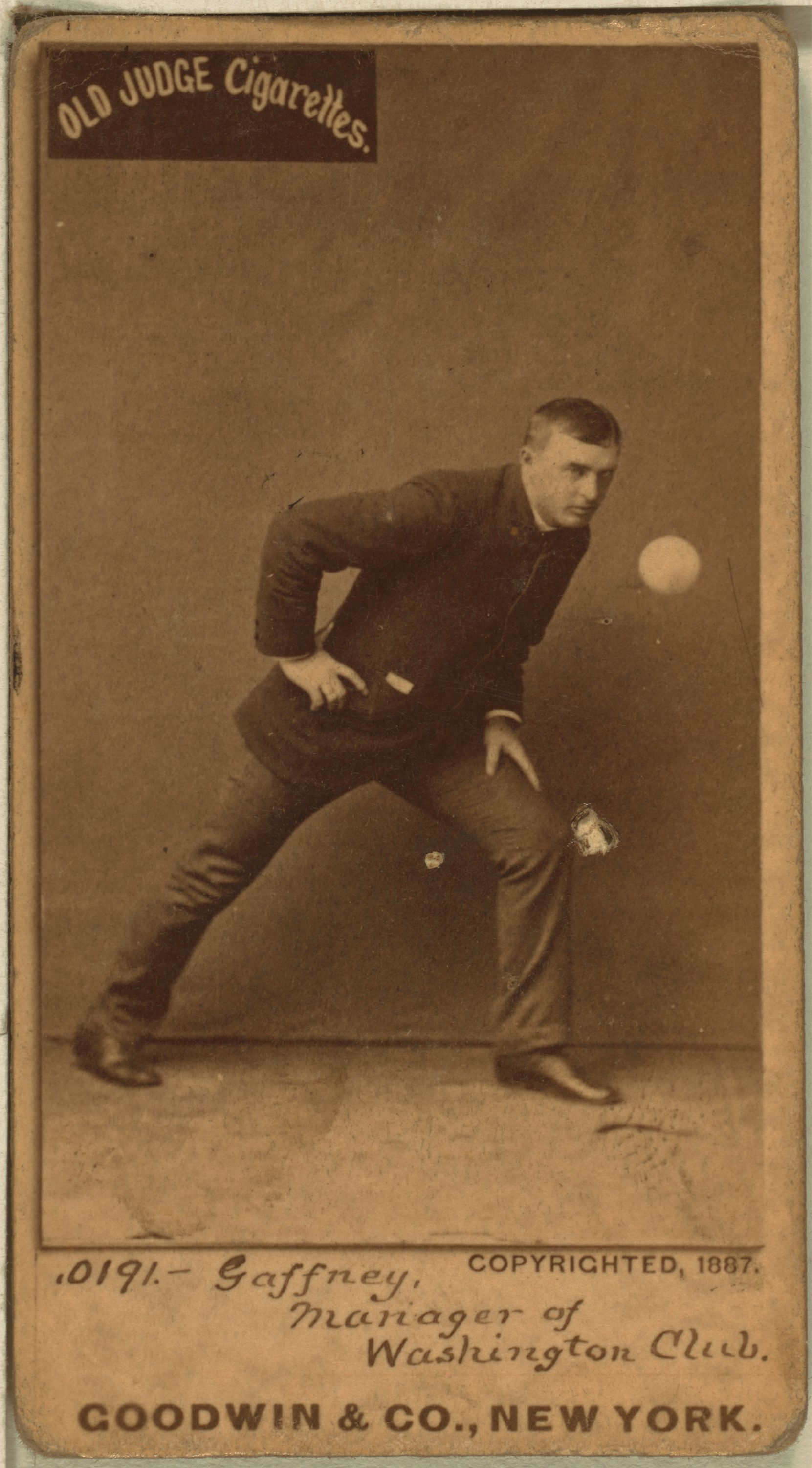 John Gaffney